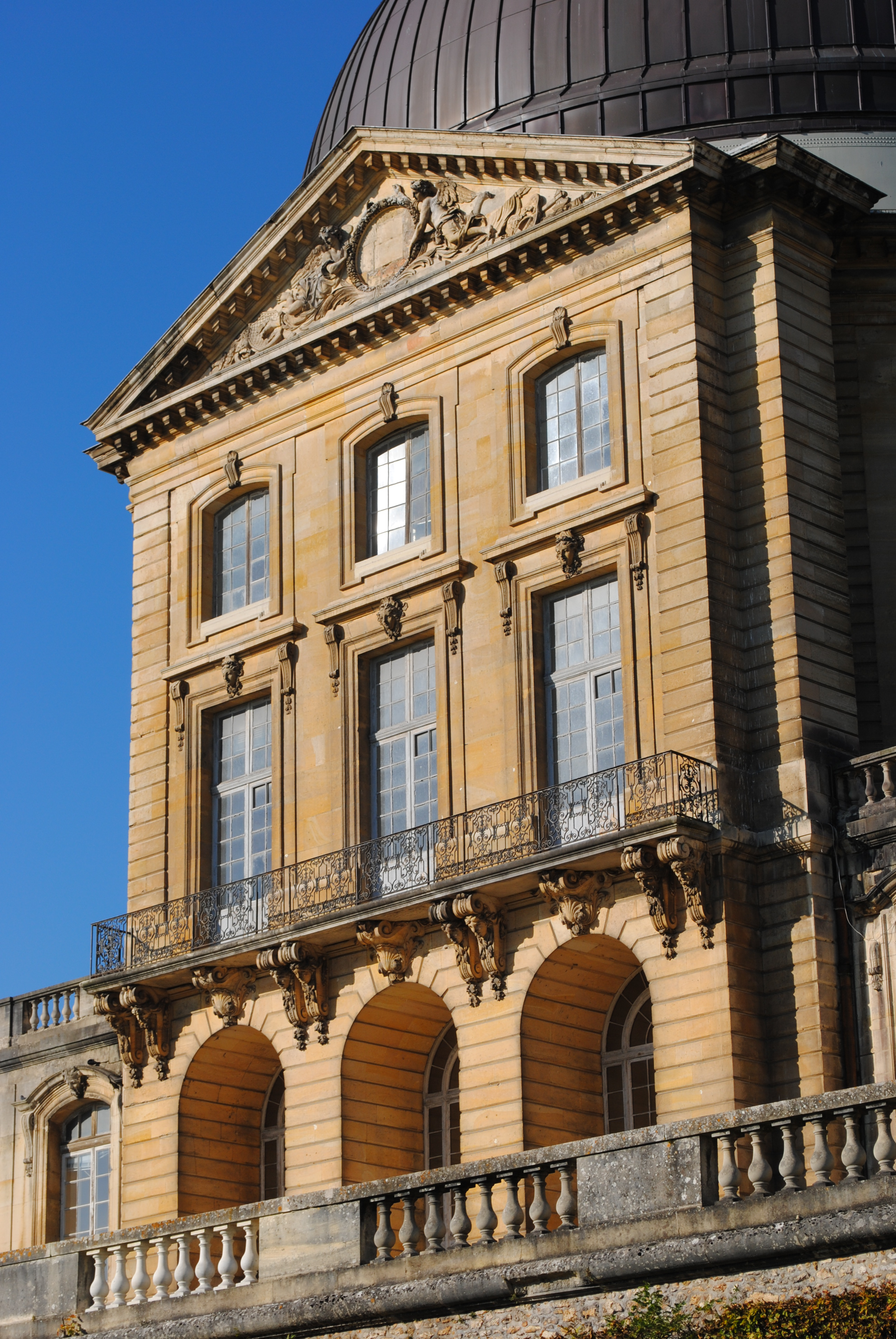 Façade conservée du Château-Neuf de Meudon, 2013.